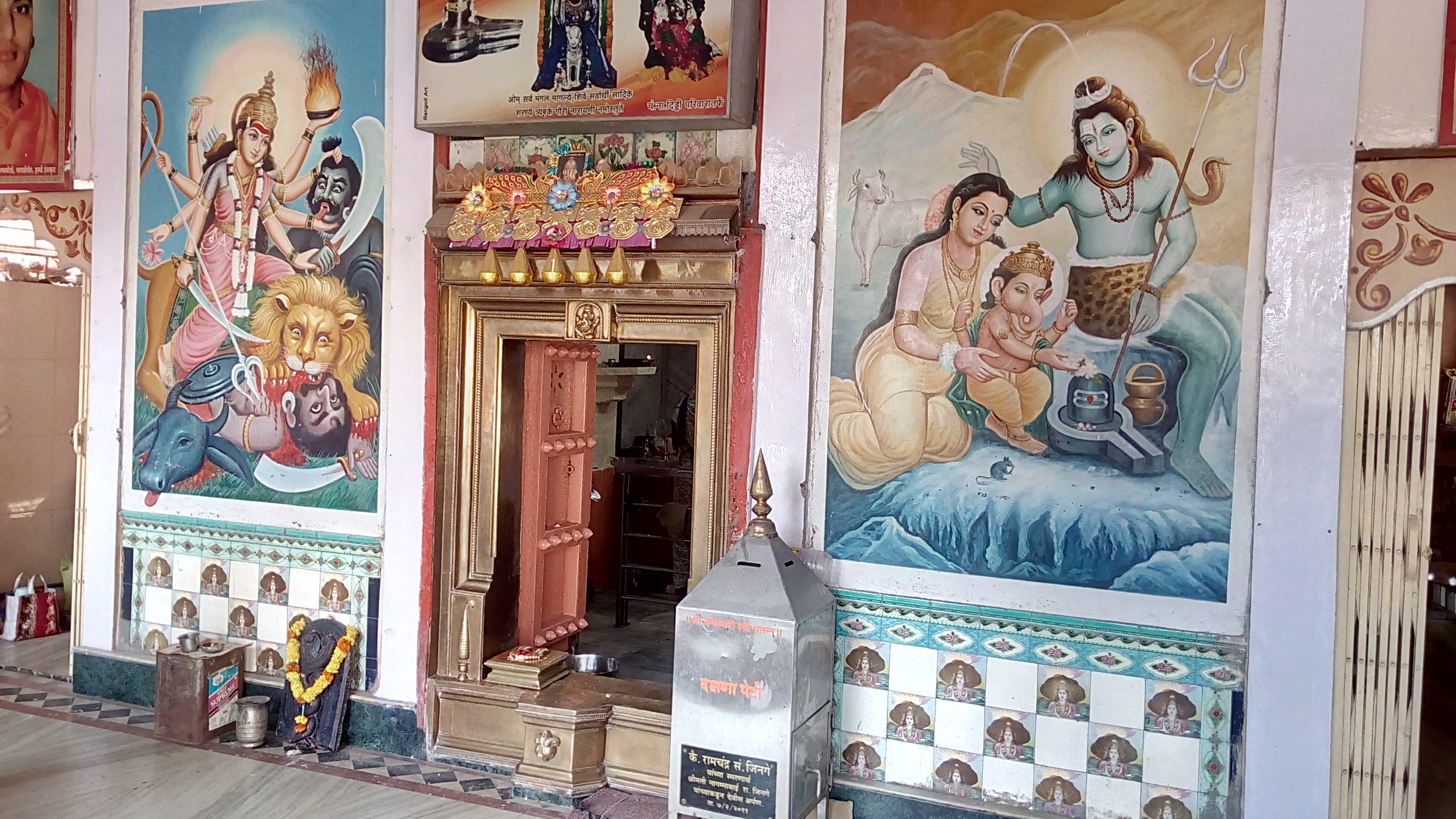 मंदिराच्या आतील नक्षी